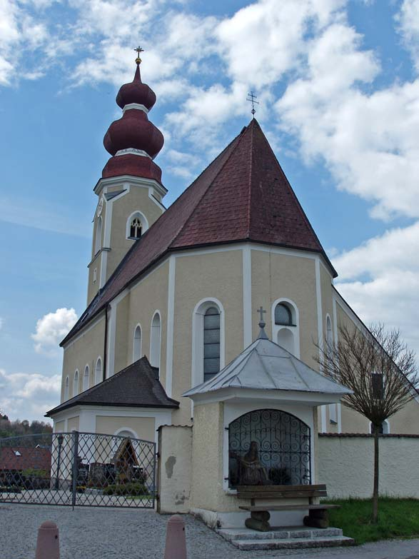 Kirche von Irrsdorf, Gemeinde Straßwalchen.